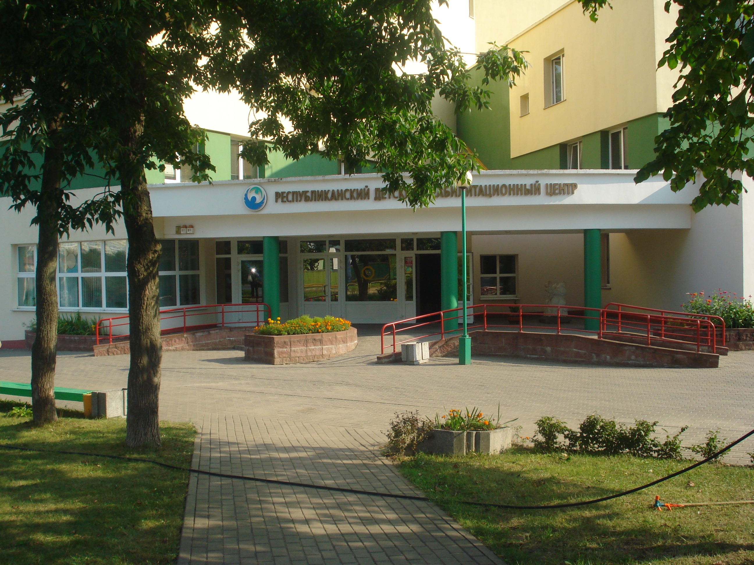 Минск.ул. Севастопольская.